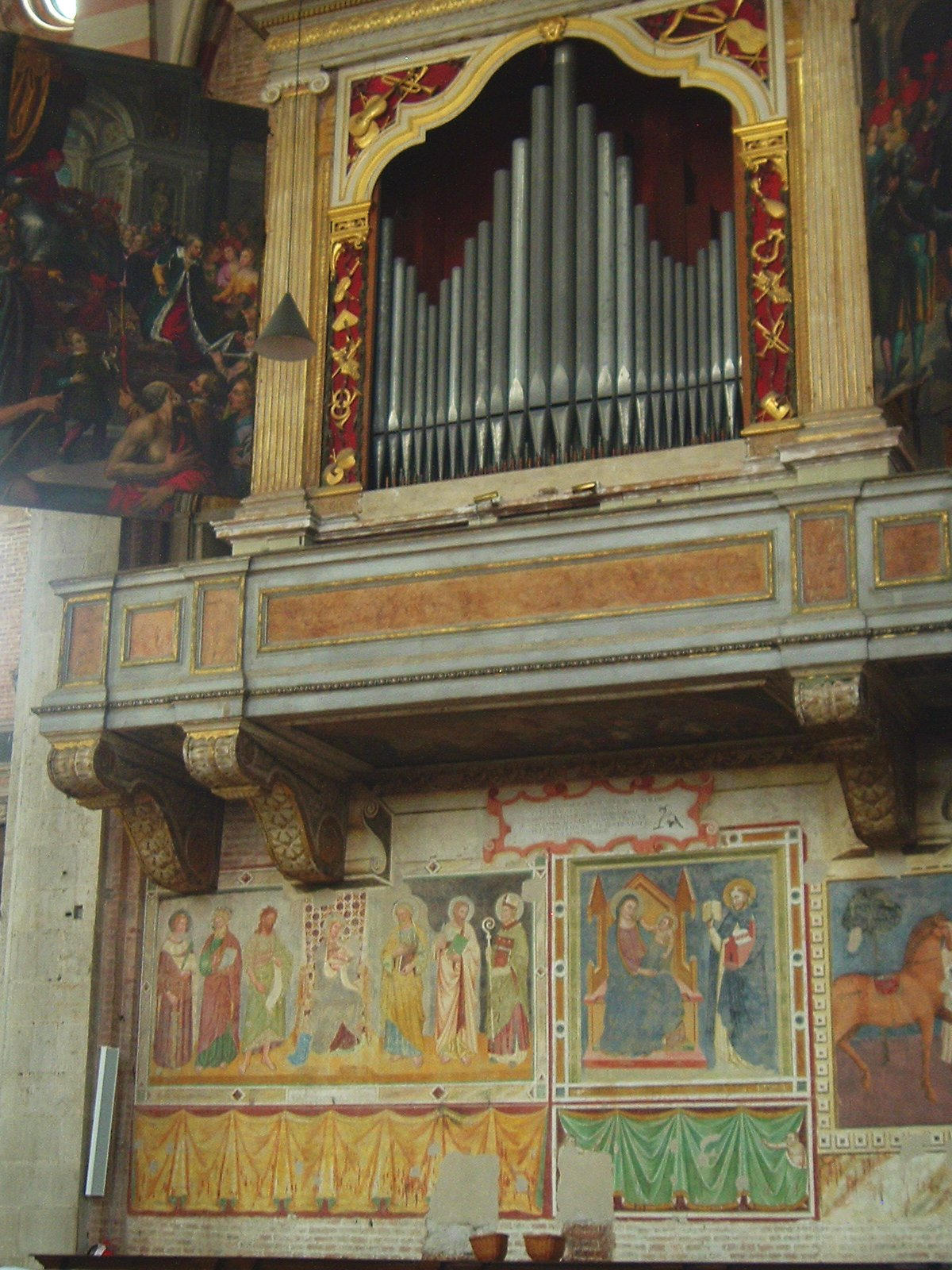 Chiesa di San Nicolò, Treviso